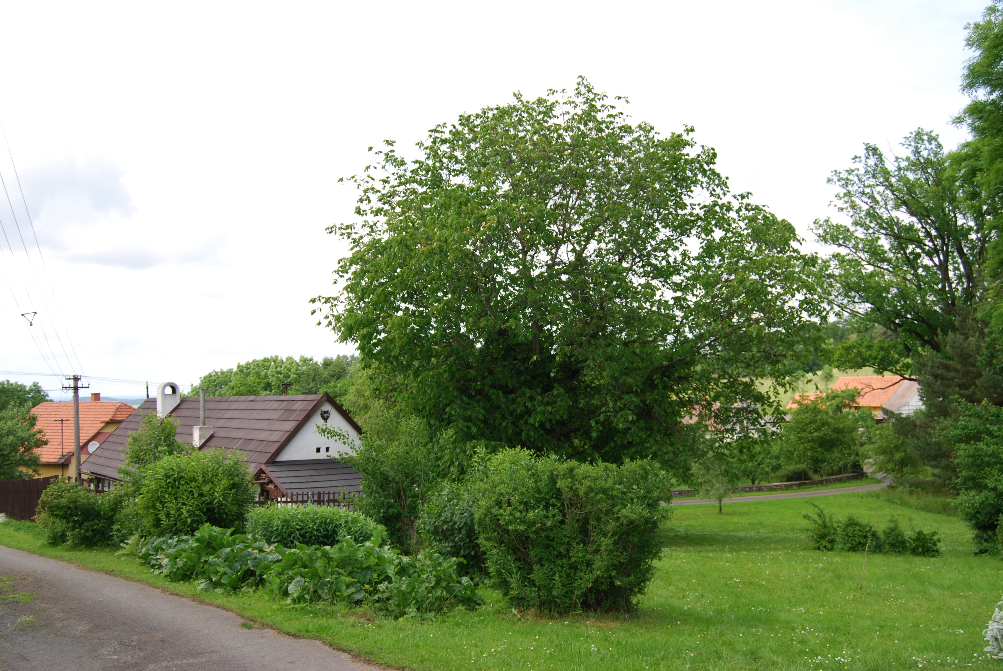 Pohled na část obce. Mezný je část obce Chyšky v okrese Písek. Česká republika.